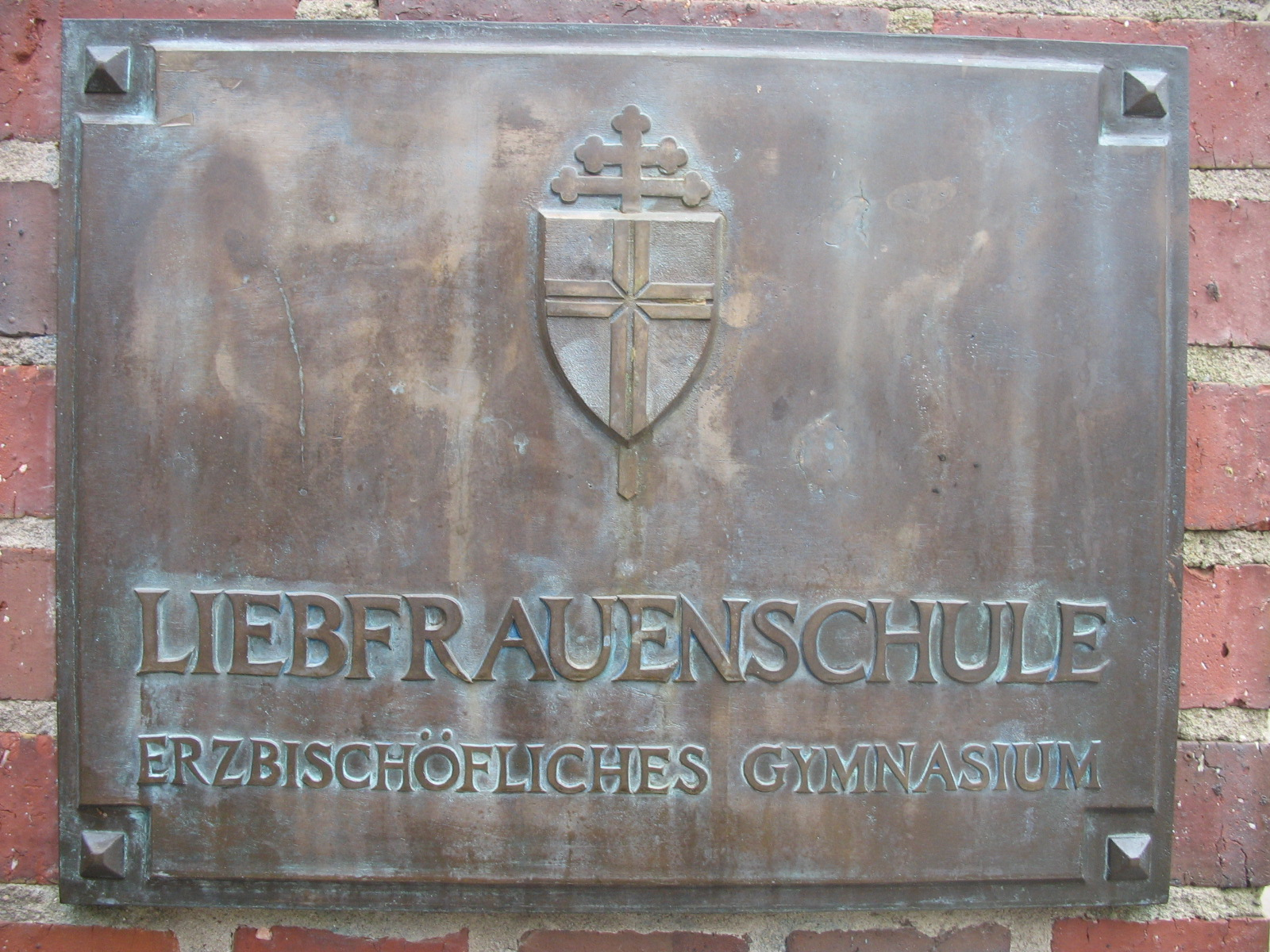 Schild der Liebfrauenschule Köln